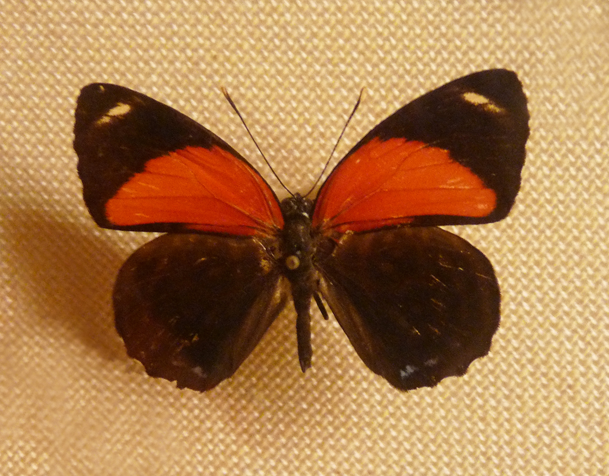 Callicore cyllene (Colombie) au Musée zoologique de Strasbourg Synonym of Callicore pygas cyllene (Doubleday & Westwood, 1847) See Funet